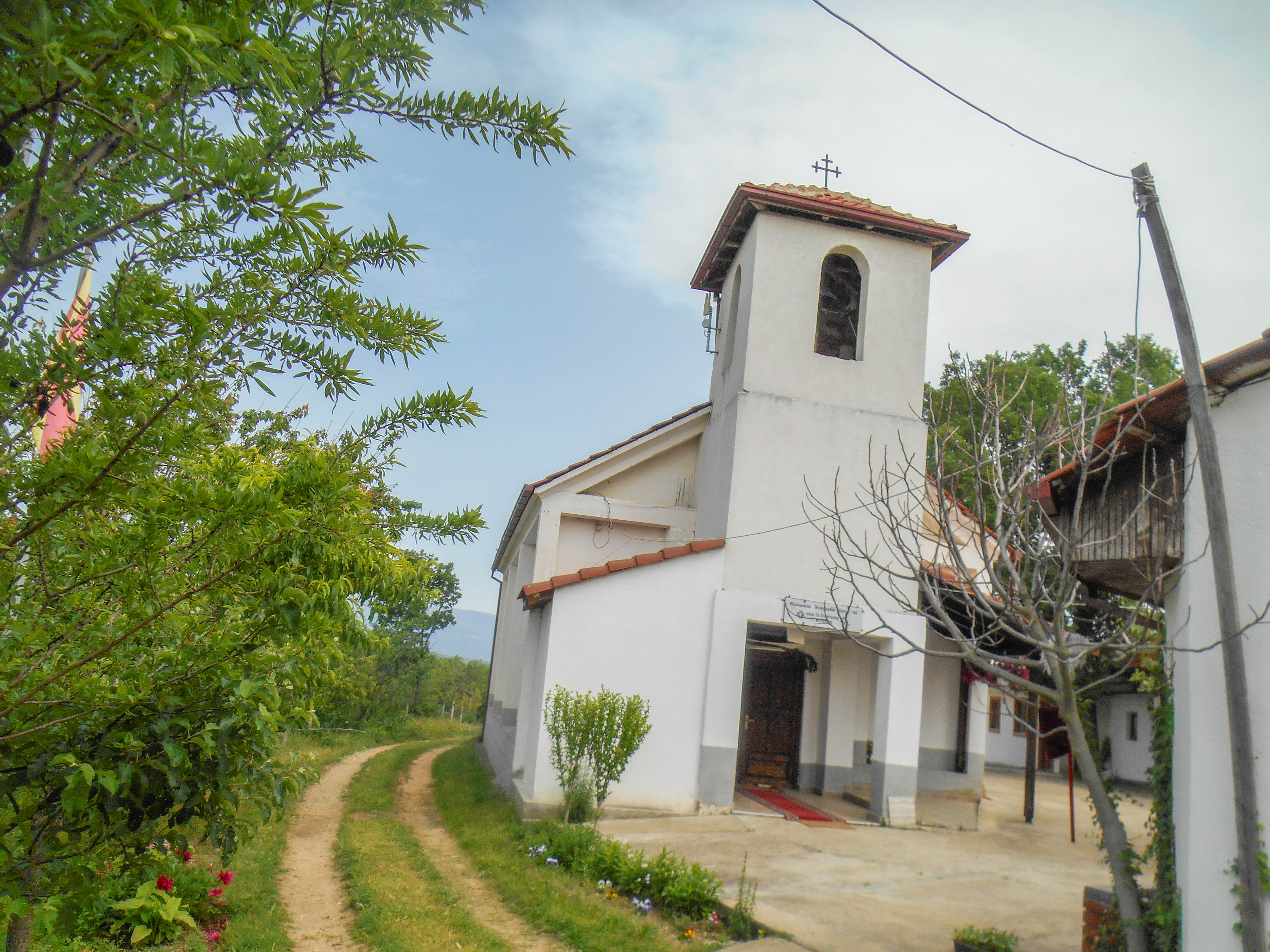 Црква „Успение на Пресвета Богородица“ - Владиевци